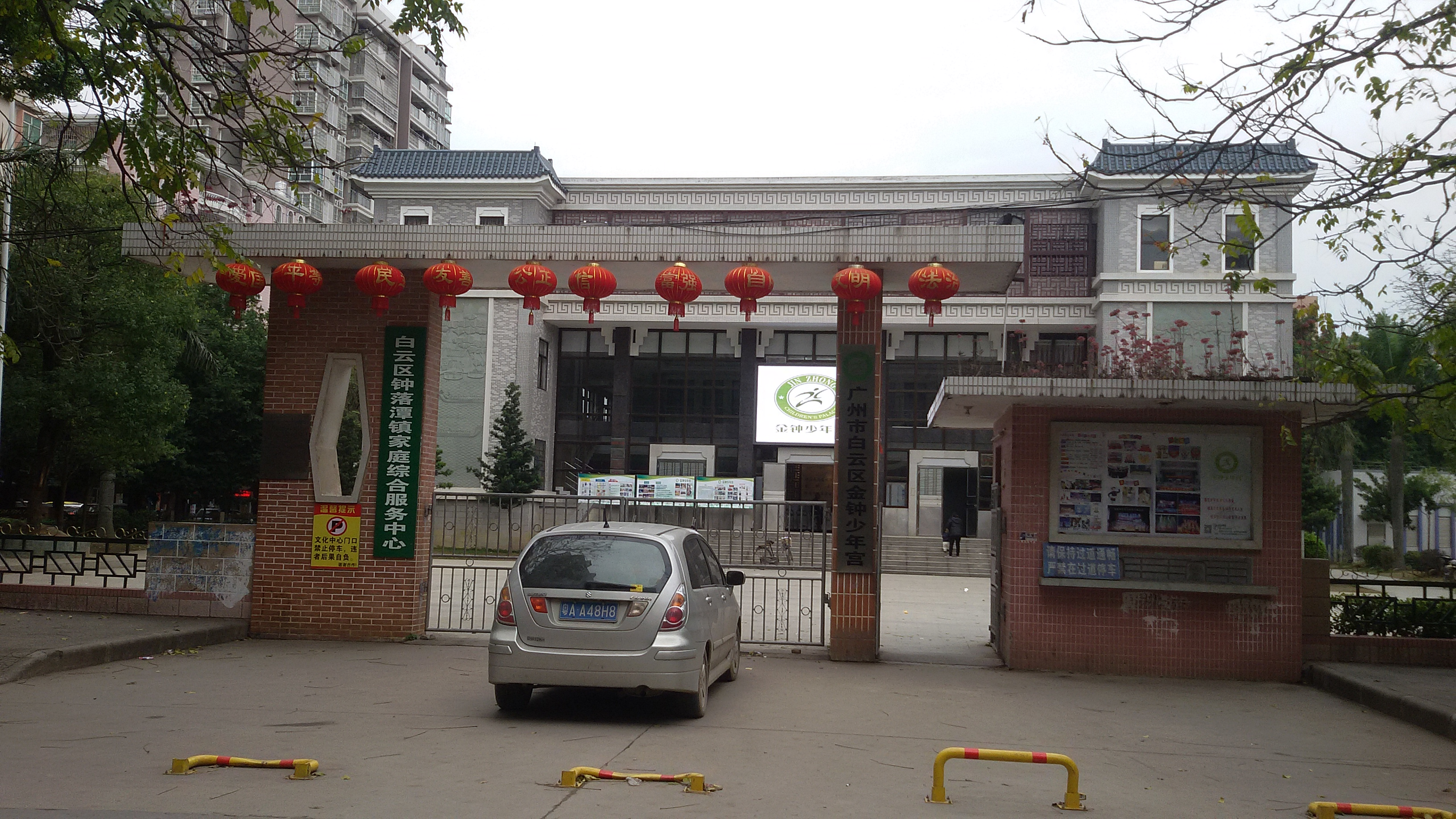 粵語: 廣東省金鐘少年宮